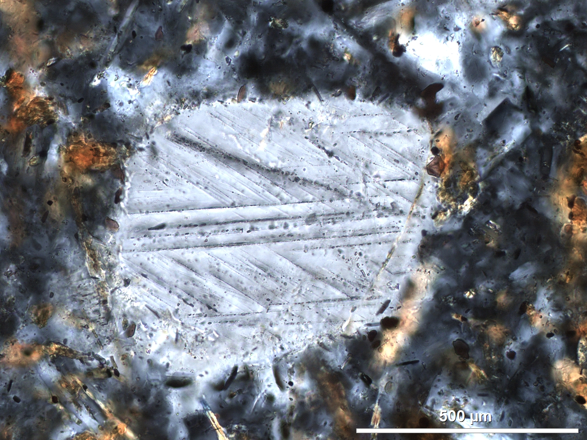 Geschocktes Quarzkorn mit planaren Elementen (engl.: planar deformation features; PDFs) in drei Richtungen in einem kristallinen Impaktschmelzgestein des Impaktkraters von Boltysh, Ukraine. Gekreuzte Polarisatoren.